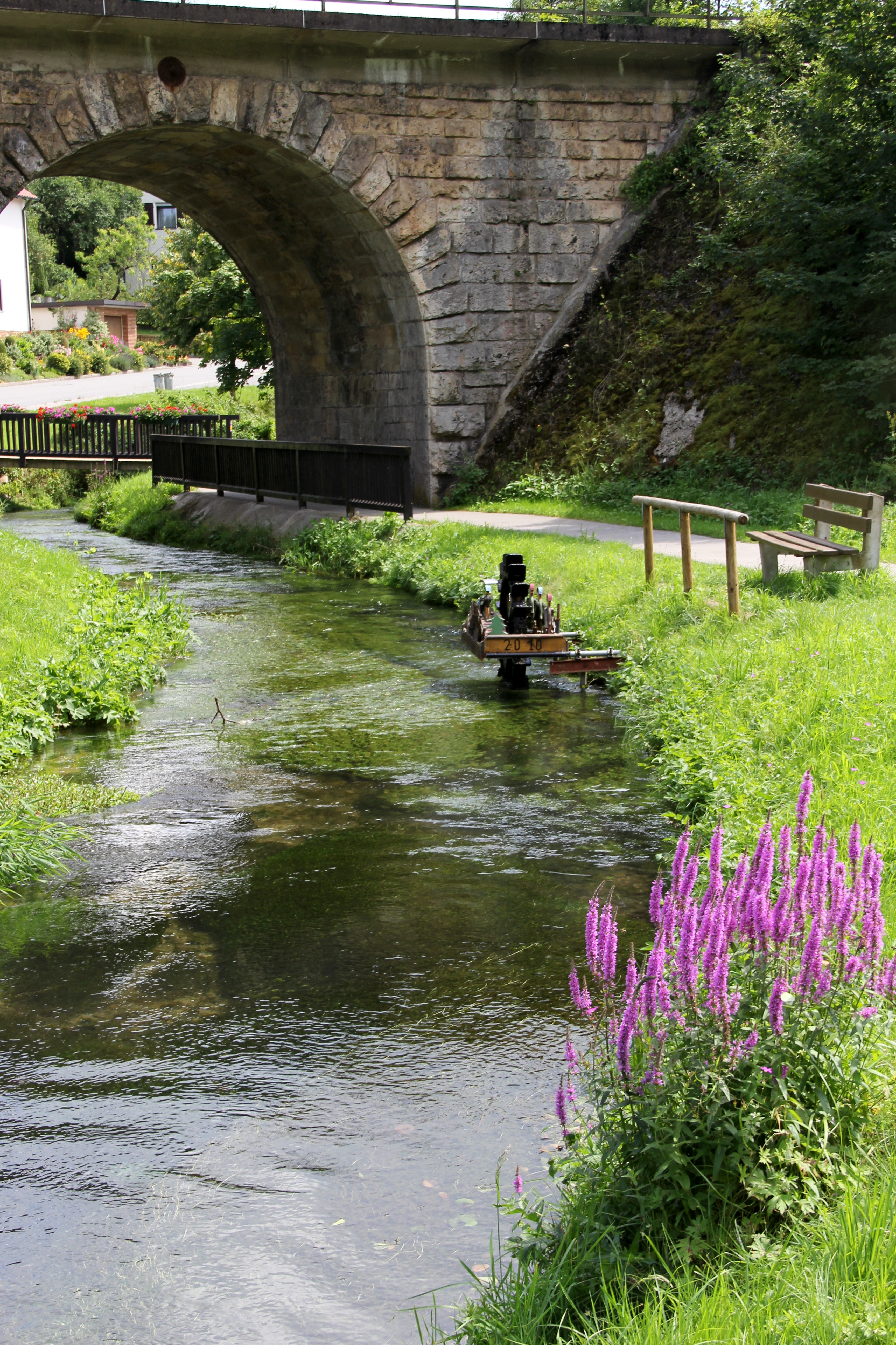 Etzelbach nahe Weigendorf